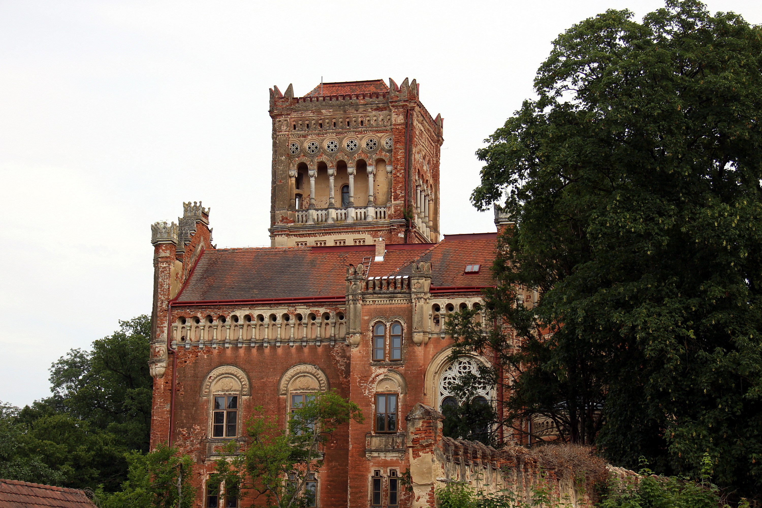 Denkmalgeschütztes Neues Schloss in Rotenturm an der Pinka - OpenStreetMap(Info)